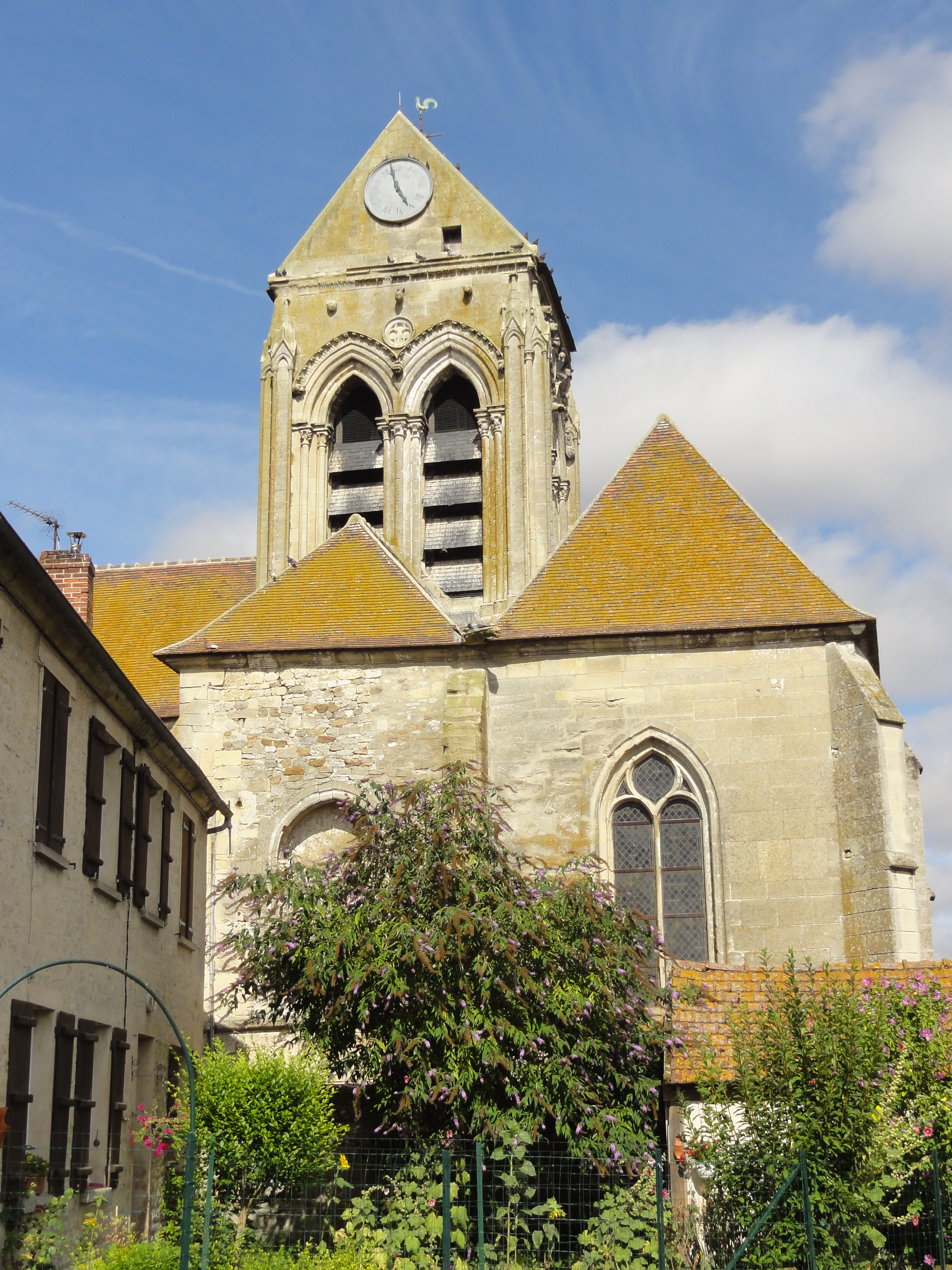 Église Sainte-Marie-Madeleine du Bellay-en-Vexin (voir titre).